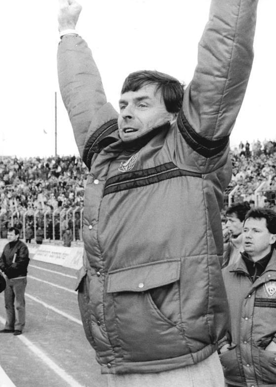 ADN-ZB-Oberst-1.4.89-fd-Berlin: BFC Dynamo gewann FDGB-Pokal- Der 1:0-Sieg über den FC Karl-Marx-Stadt brachte der Berliner Auswahl den Pokalsieg zum drittenmal in ihrer Klubgeschichte. Trainer Jürgen Bogs veranlaßte dies zu anschließenden Jubelsprüngen.